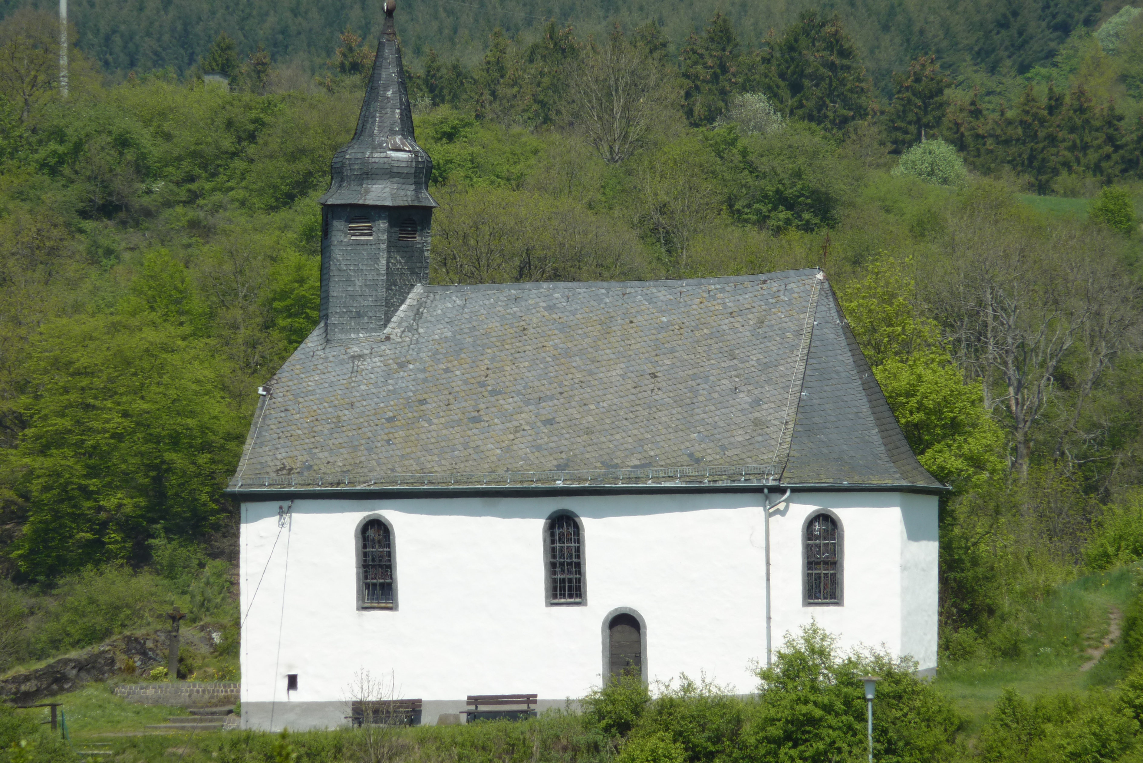 Kapelle St. Trinitatis in Virneburg